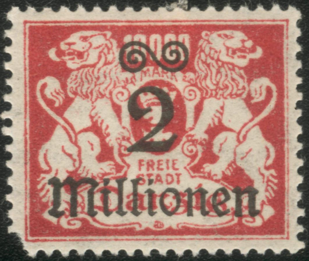 Почтовая марка вольного города Данциг номиналом 10000 немецких марок с надпечаткой 2 миллиона марок.